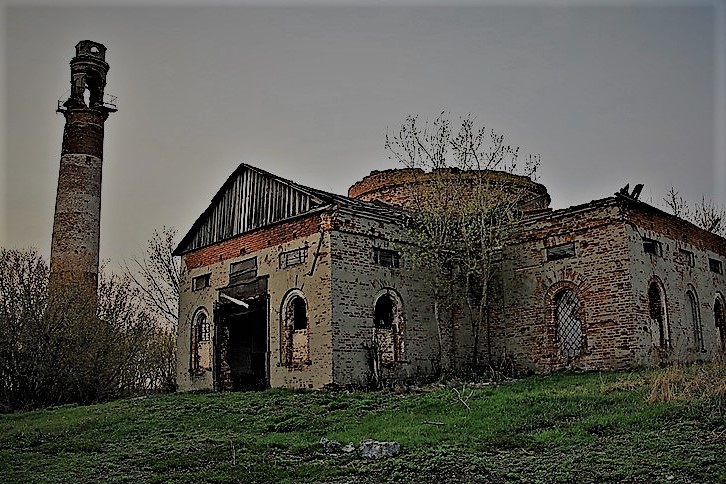 Архитектурный памятник.